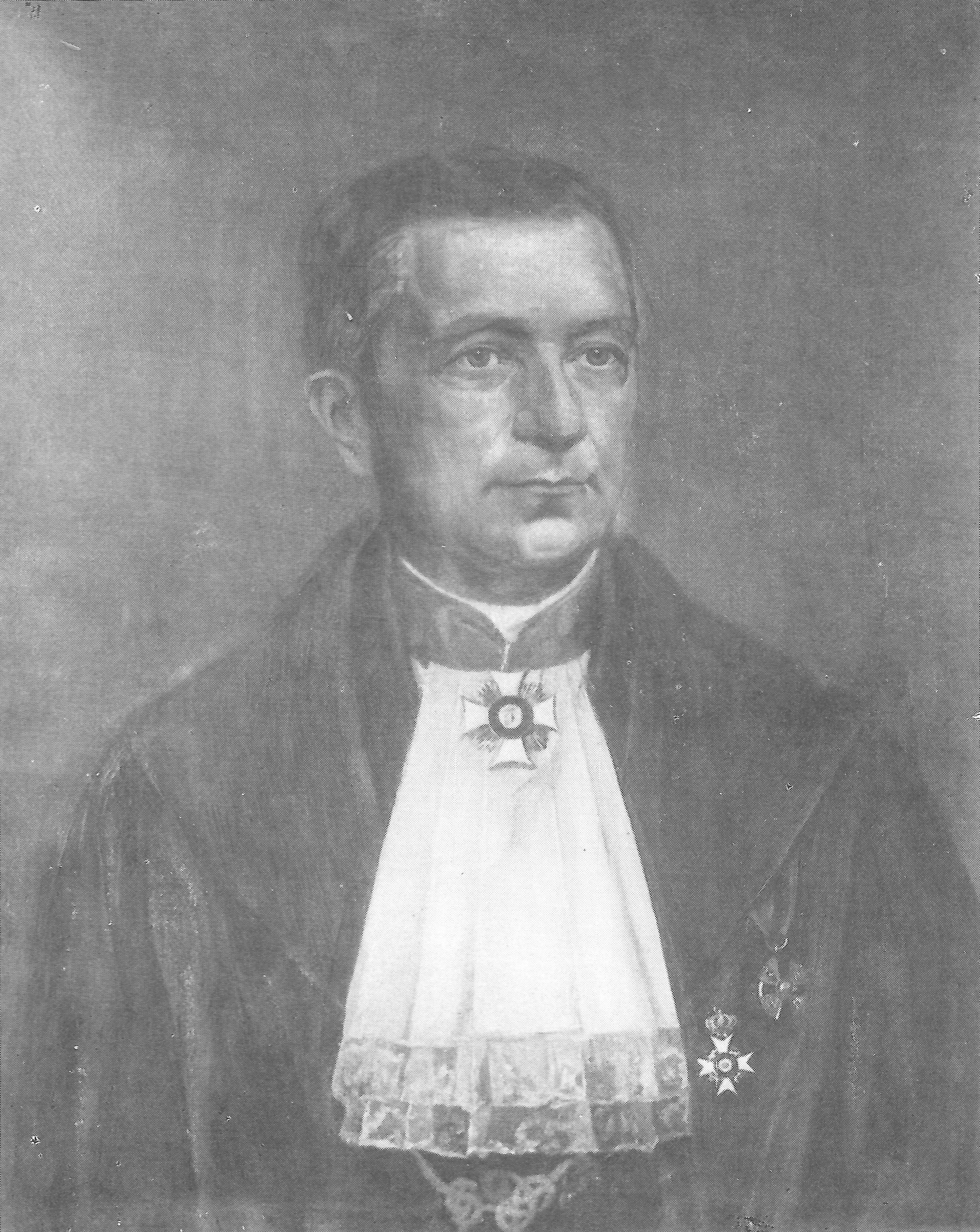 Karl von Vierordt 1818-1884 (Porträt in der Tübinger Professorengalerie)